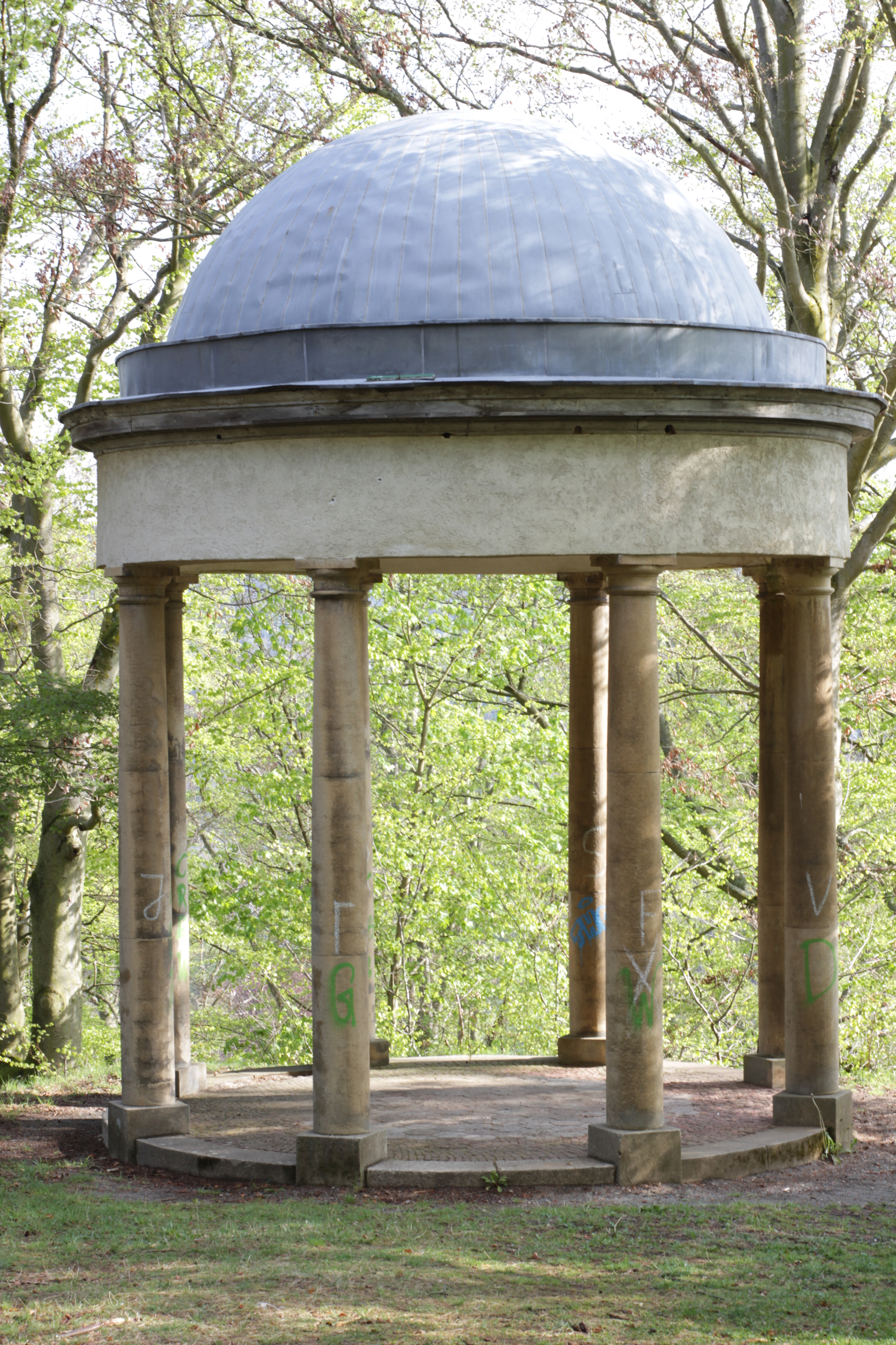 Der Tempel wurde anlässlich der Vermählung des Fürsten Heinrich XIX. Reuss älterer Linie mit der Prinzessin Gasparine de Rohan-Rochefort und Montauban erbaut. Das Bauwerk ist 8m hoch, hat einen Durchmesser von 6m und steht auf acht Granitsäulen.